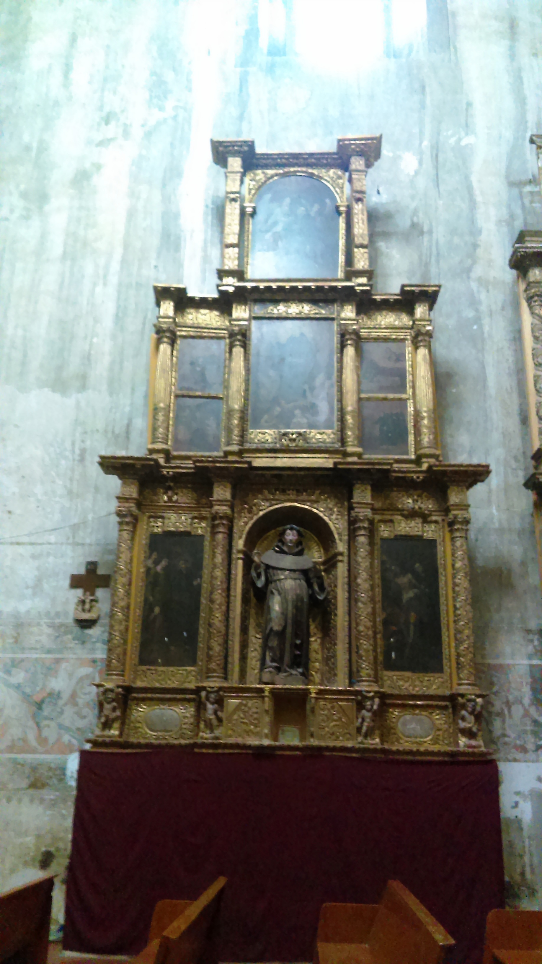 Templo y exconvento de los Santos Reyes, Metztitlán.